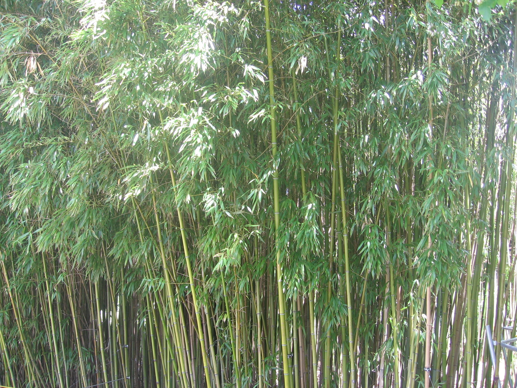 autor:Vladaig my photo